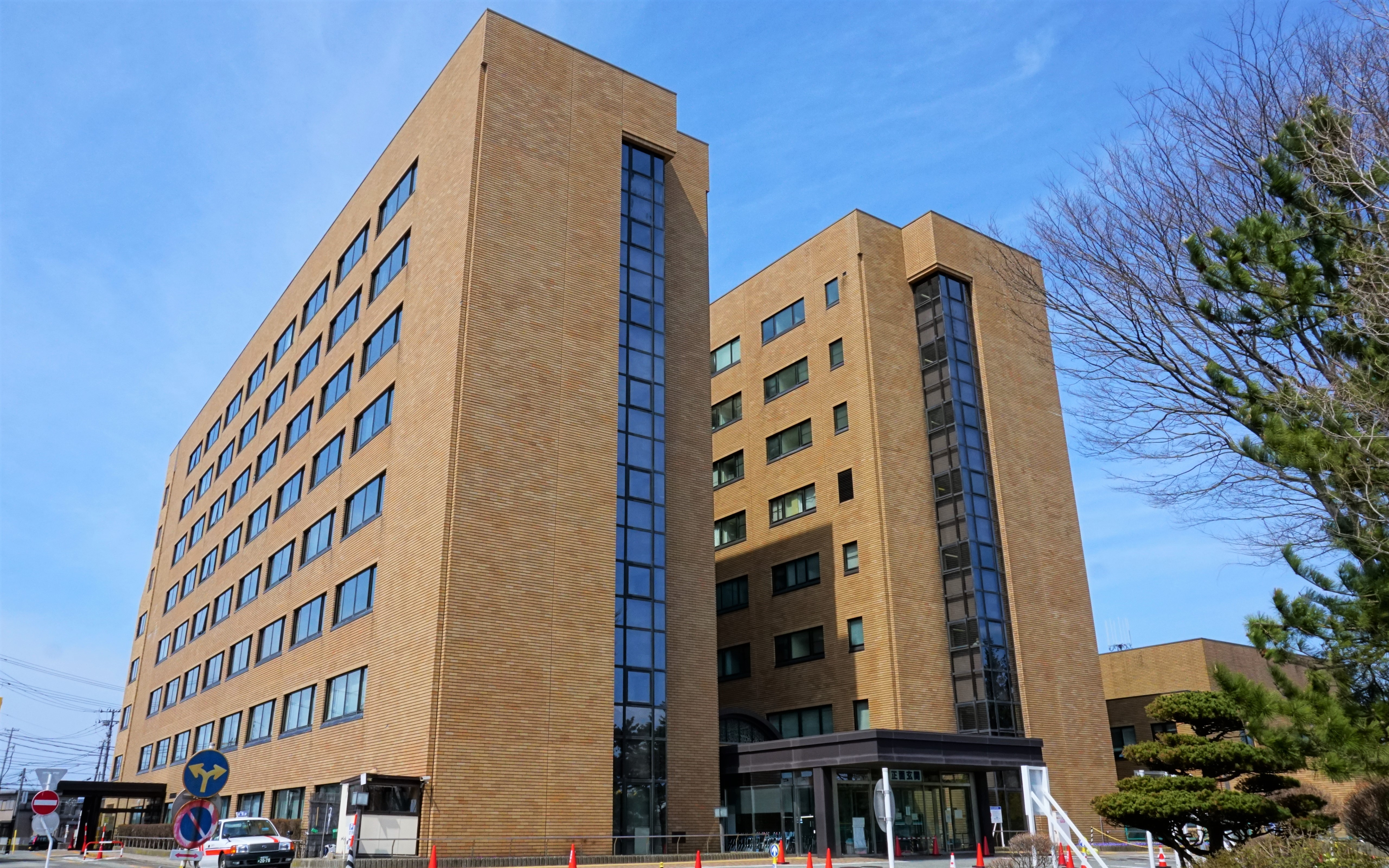 市立秋田総合病院。築35年以上を経た現病棟は建て替えの方針が決まっている。